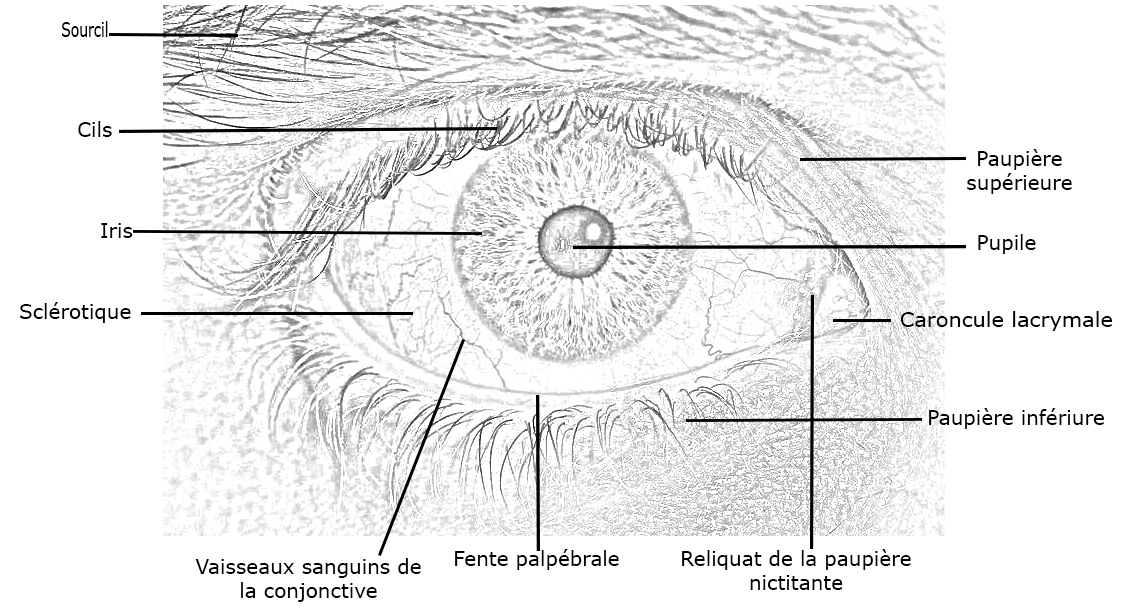 Effet dessin de : Eye Central Heterochromia